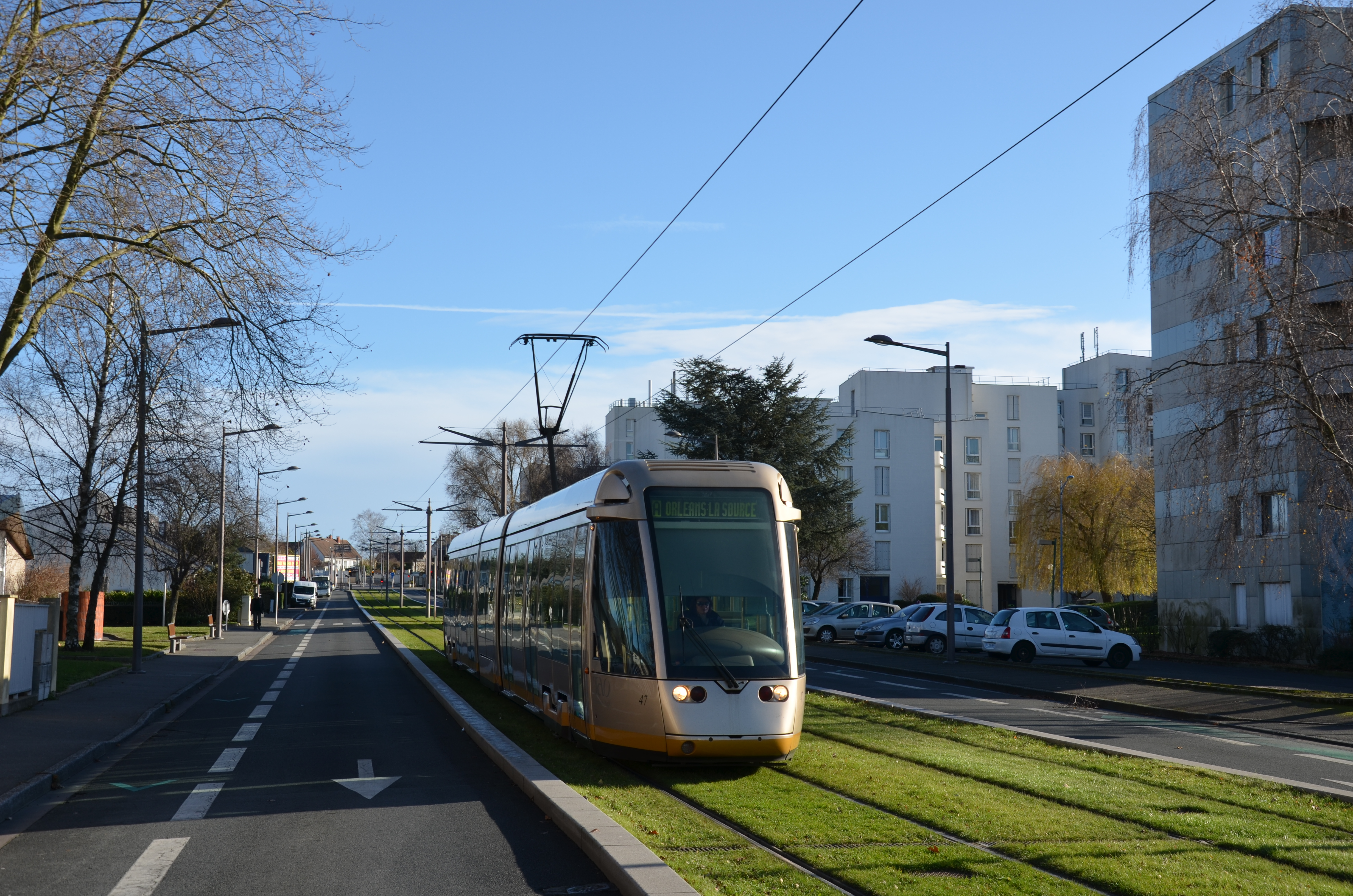 La rame Alstom Citadis 301 n°47 du réseau TAO d'Orléans quitte le terminus Jules Verne, sur la ligne A, en direction d'Orléans La Source.